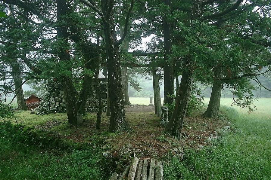 池山池の真ん中の島に神社がある